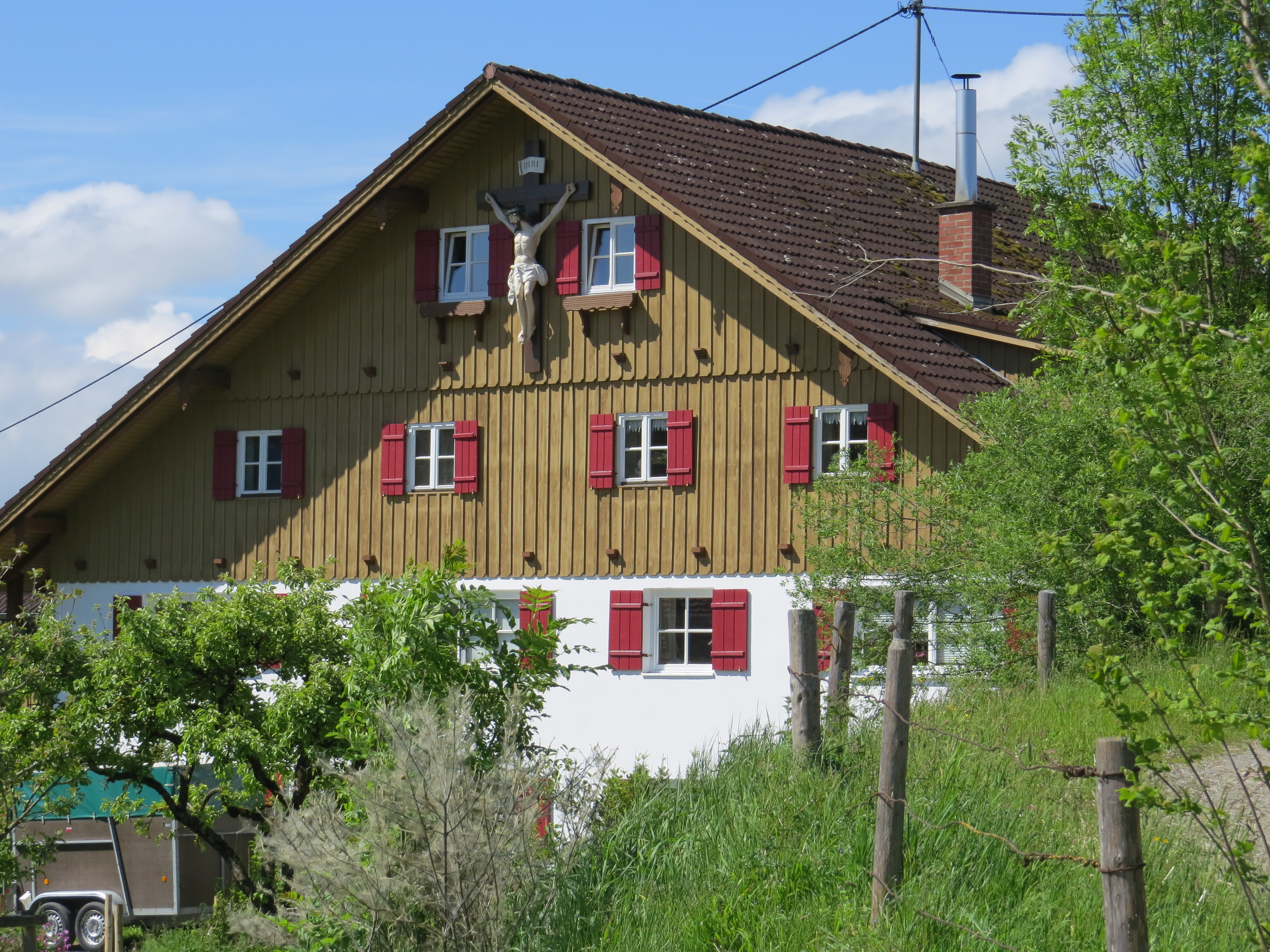 Riedhof 2, Stötten am Auerberg